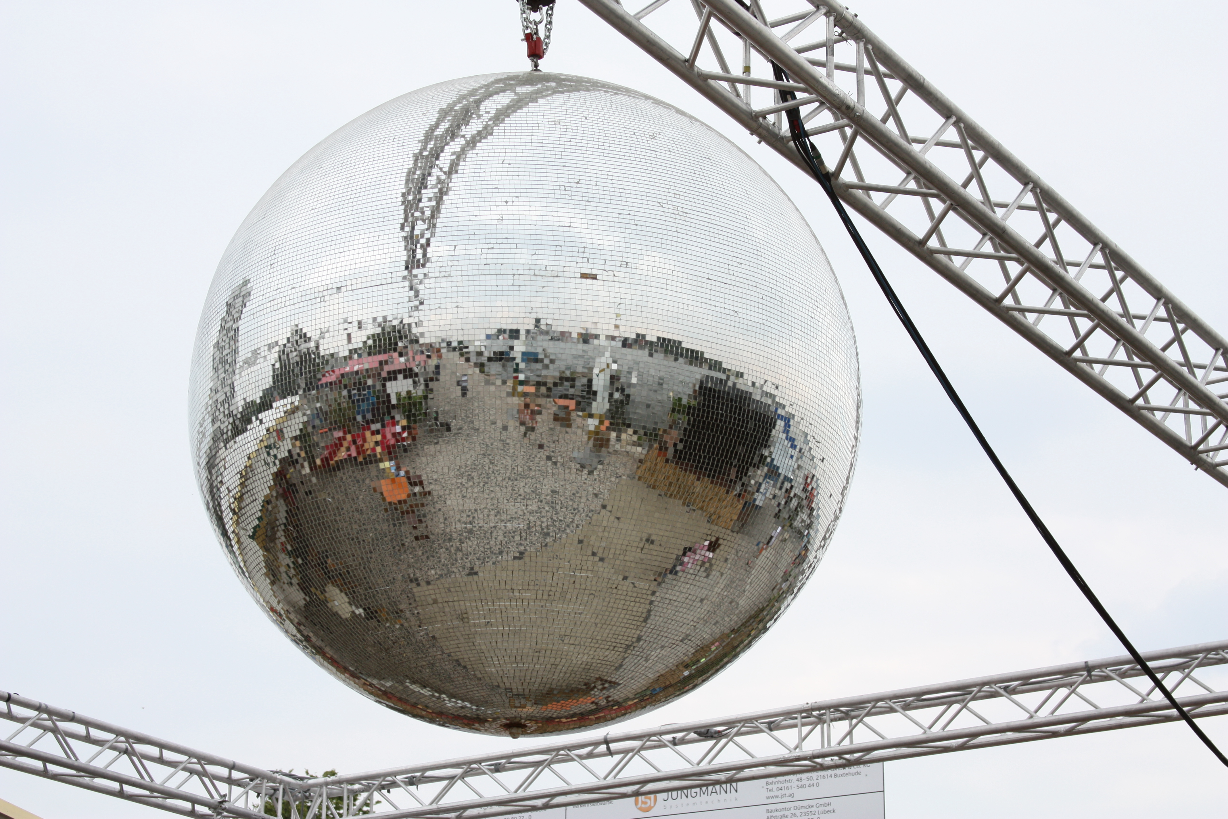 Disco-Kugel